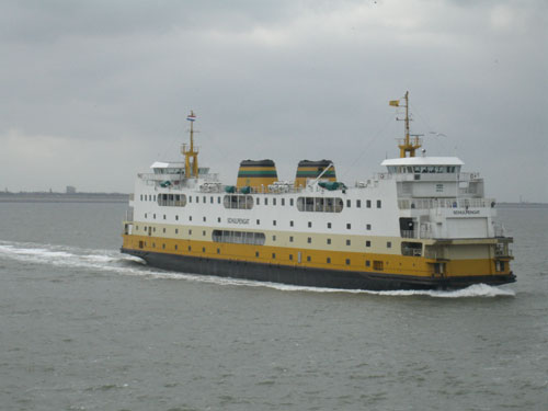 Veerboot Schulpengat van Texels Eigen Stoomboot Onderneming